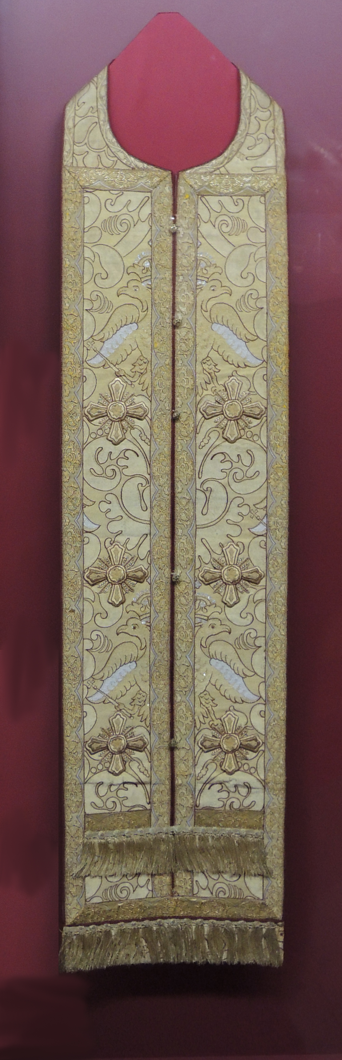 Фелонь, епитрахиль и набедренник. Москва, фирма А. и В. Сапожниковы. 1896. Золотная парча, шелк, галун. Являются частью большого комплекса парадных богослужебных облачений, выполненных для духовенства Успенского собора к коронации Николая II.